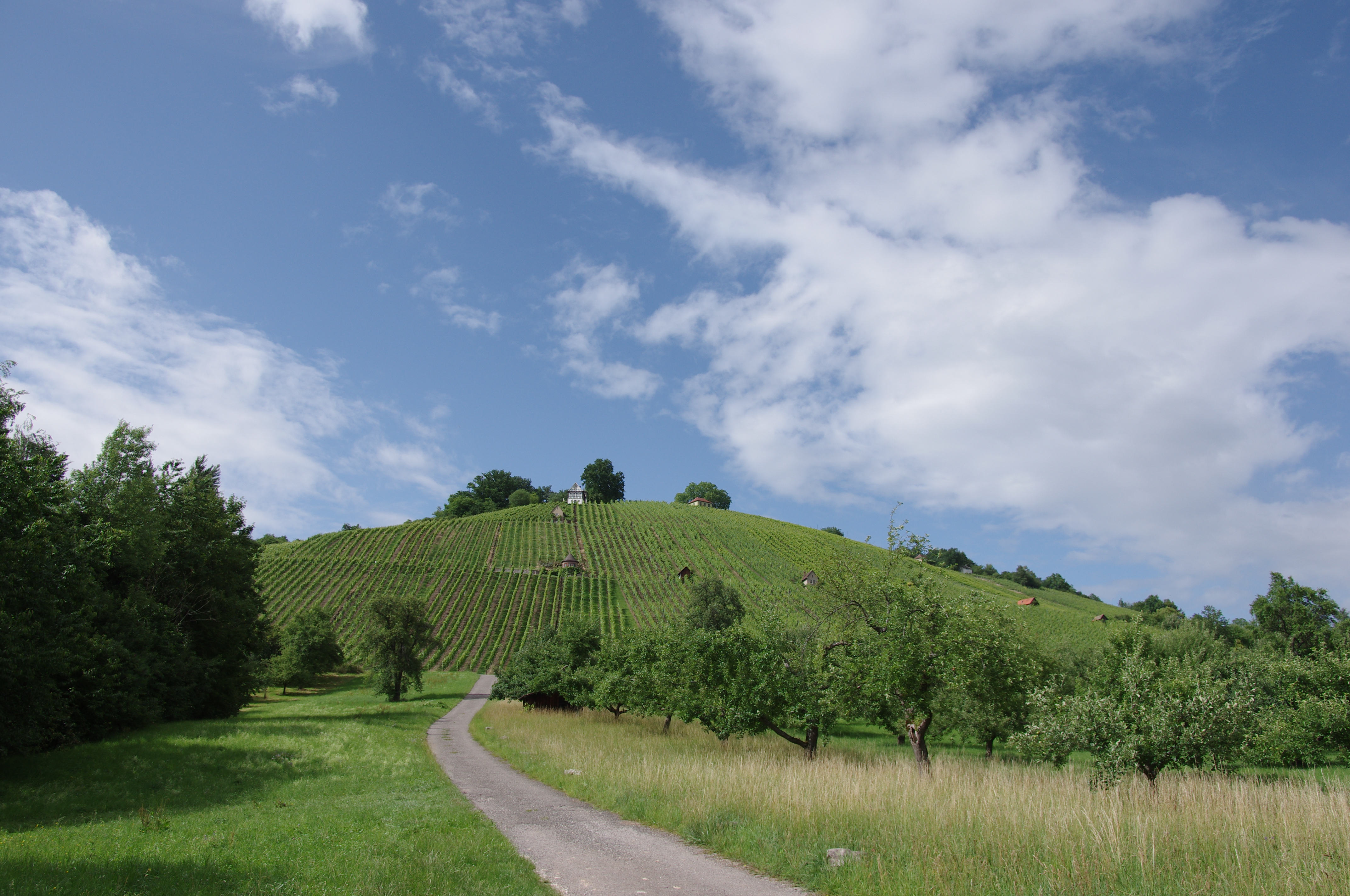 Grafenberg, Schorndorf, Baden-Württemberg. Der Grafenberg befindet sich im Landschaftsschutzgebiet Zipfelbachtal, Korber Kopf, Buocher Höhe, Remstalhänge, Ramsbachtal und Grafenberg.